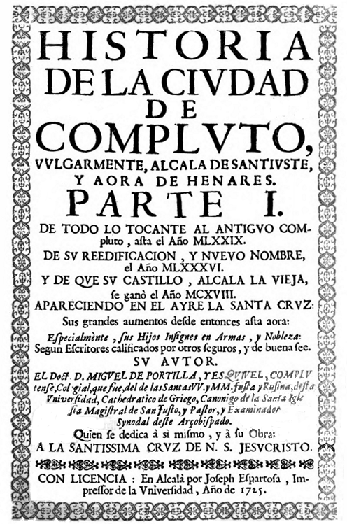 Miguel Portilla y Esquivel. Historia de la ciudad de Compluto, vulgarmente Alcalá de Santiuste, y aora de Henares (parte I). Alcalá de Henares: José de Espartosa; 1725.